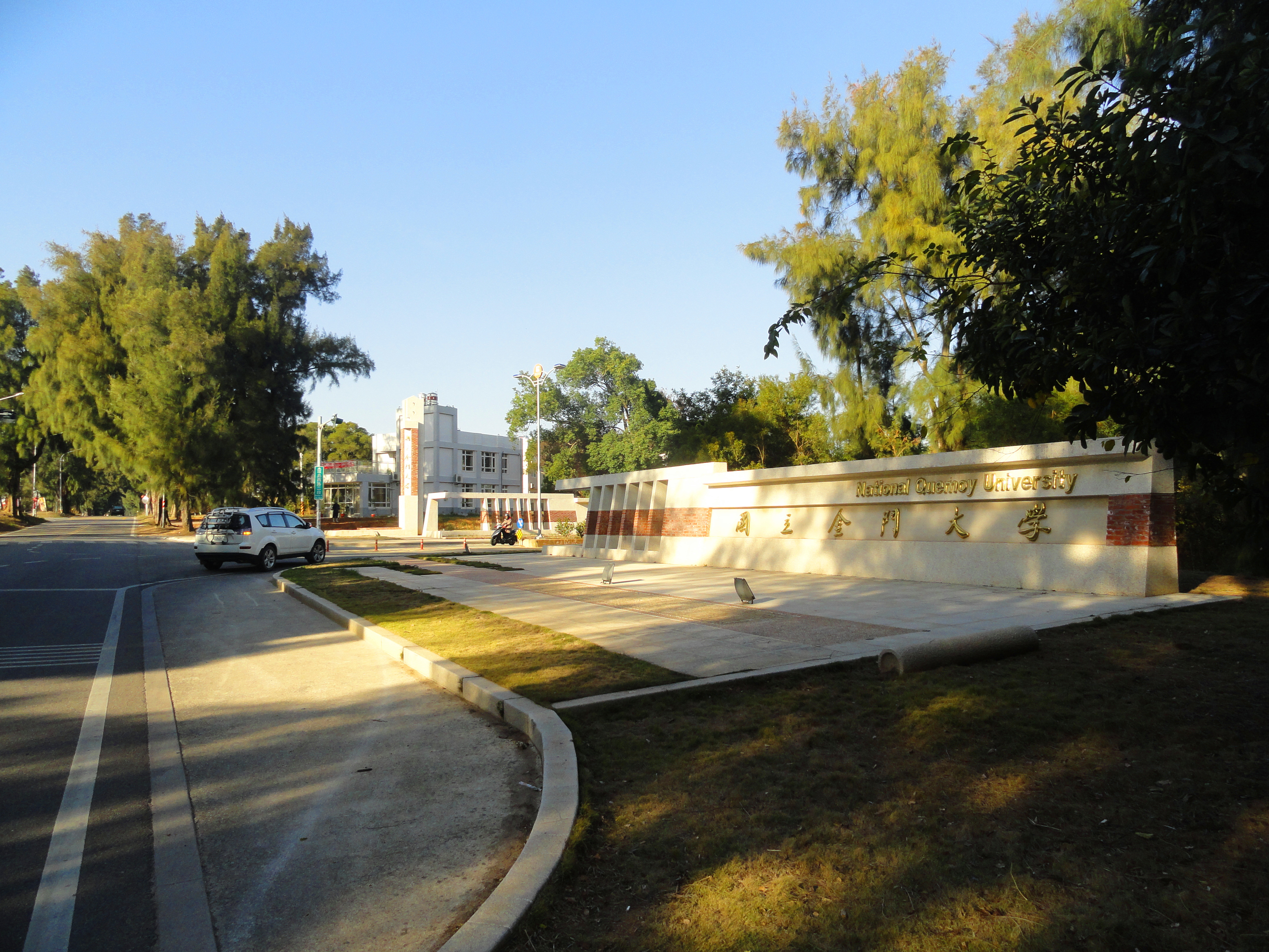 中文（中国大陆）: 国立金门大学西校门